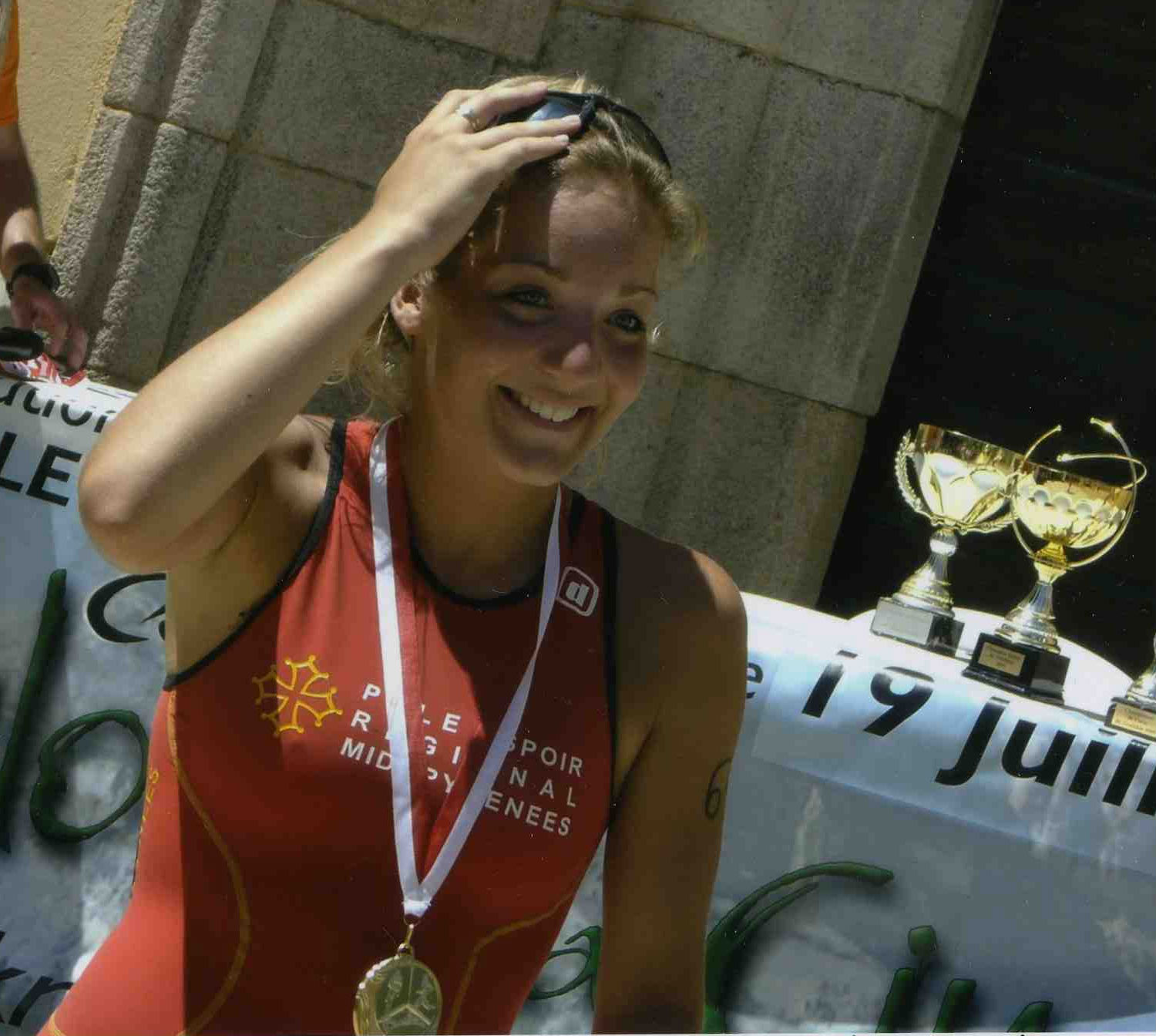 Marion MARMORAT-MORELLINI Championne de Corse de Triathlon 2009